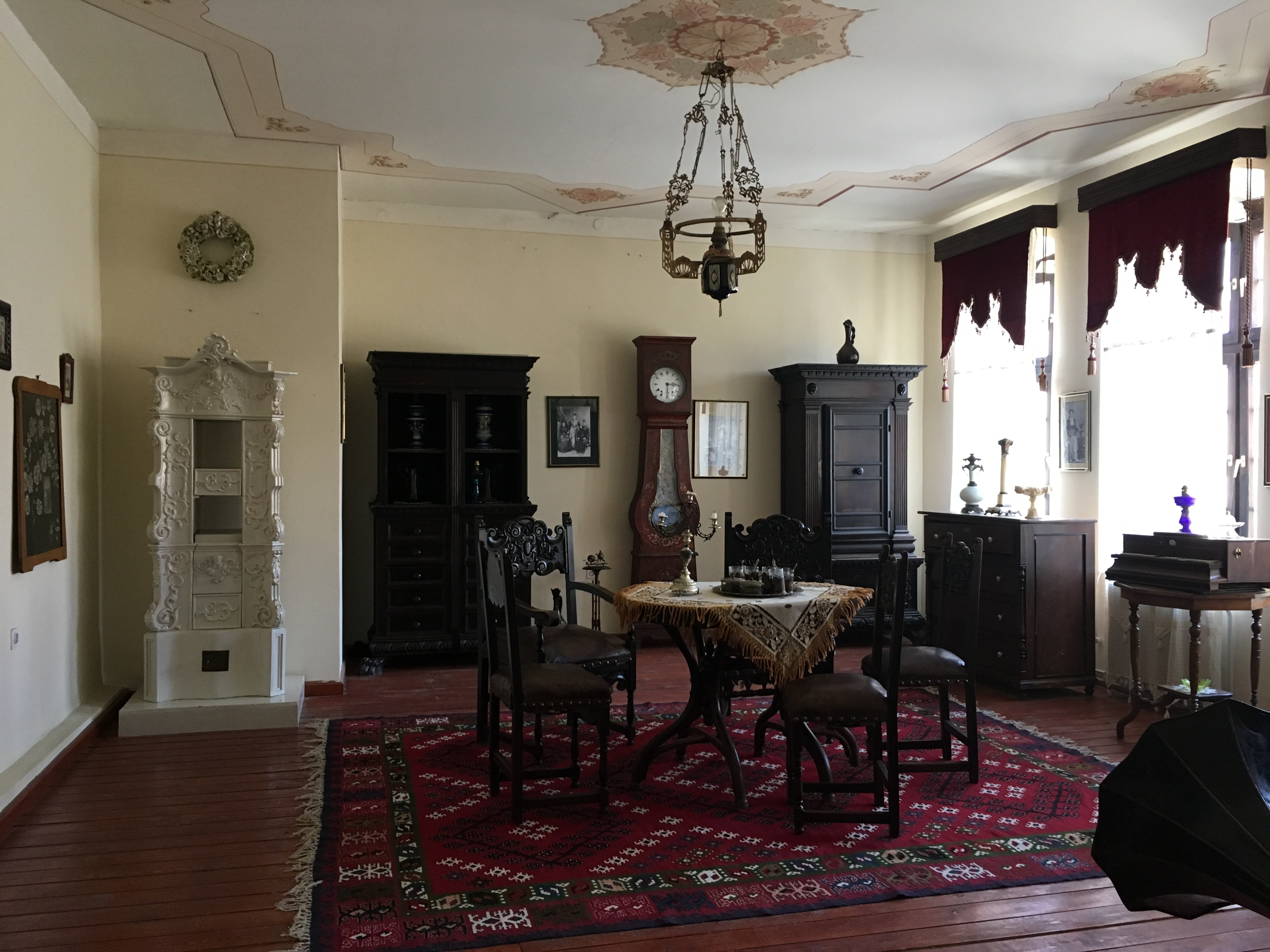 Битолска градска одаја, Завод и музеј Битола